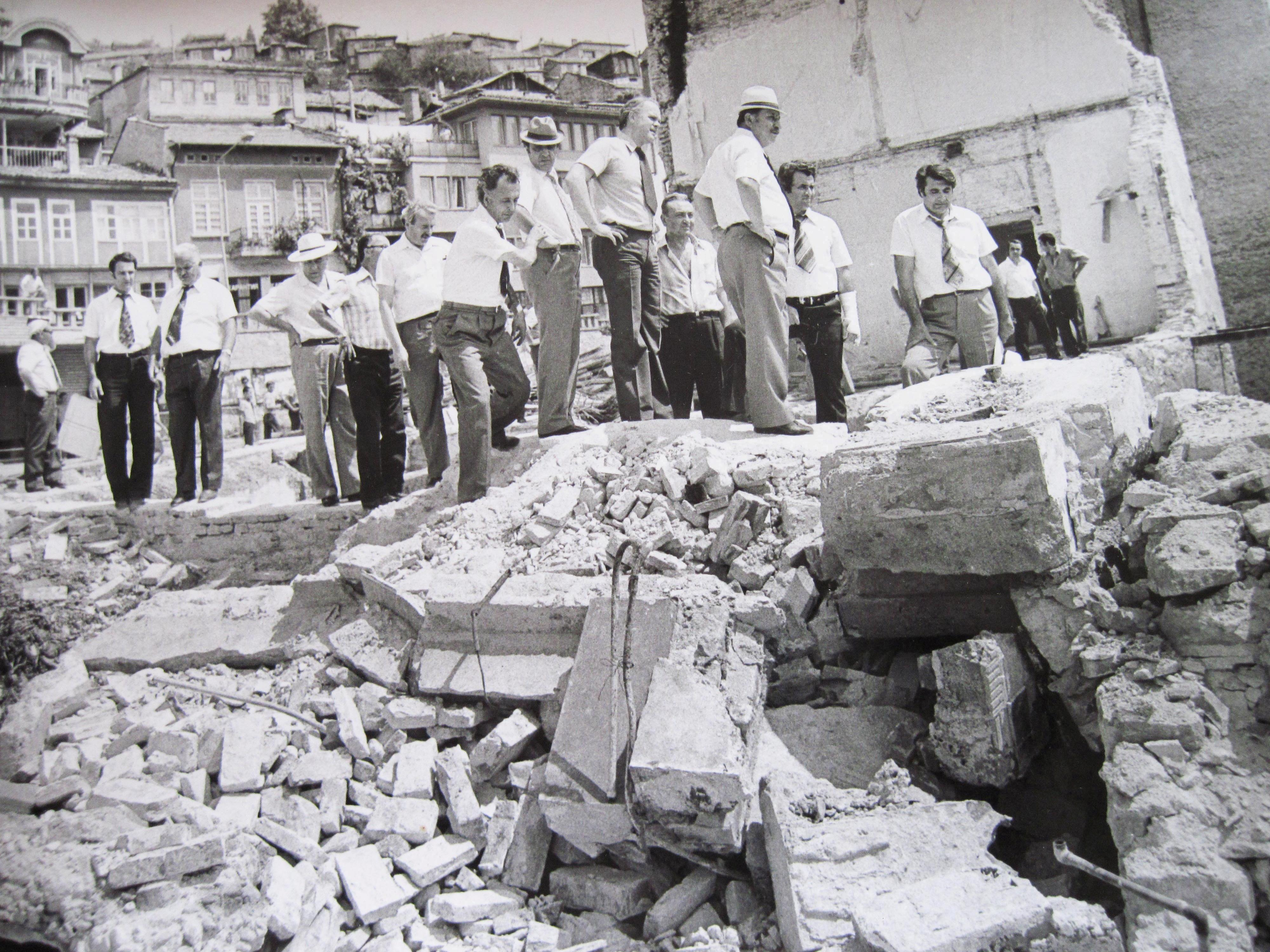 Свлачището под Варуша, Велико Търново